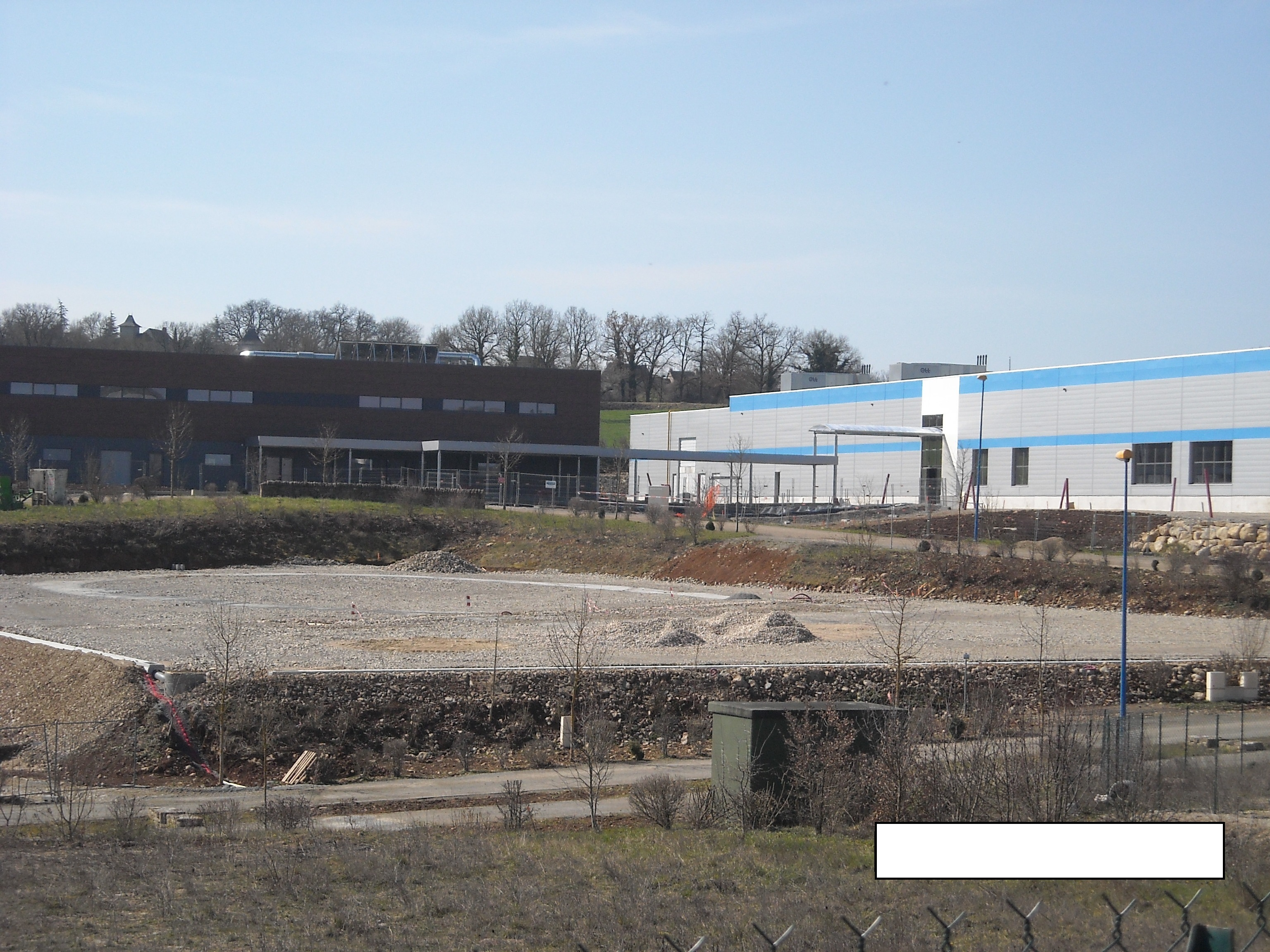 photo de la zone d'activité présente sur la commune de la Rouquette.